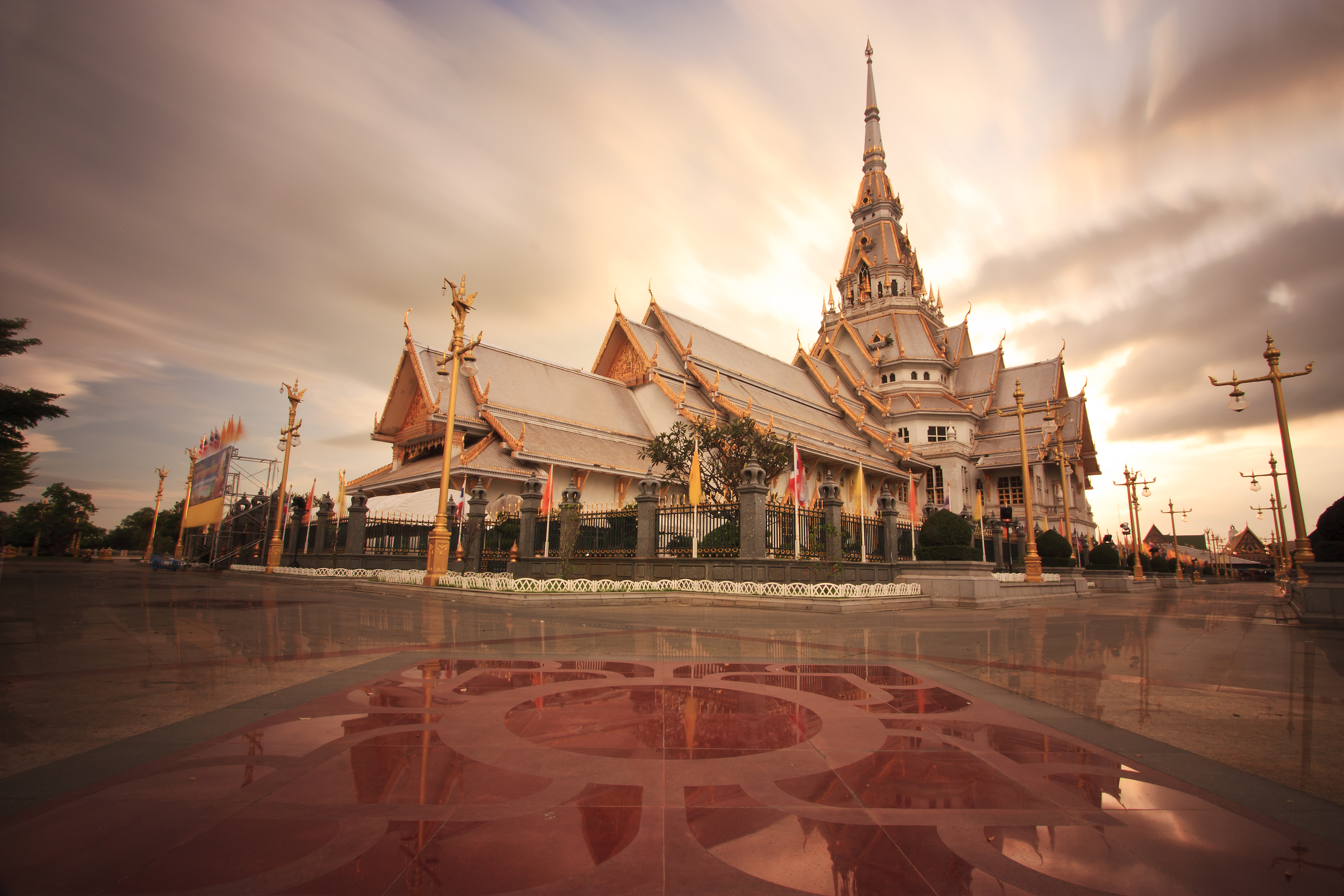 วัดโสธรวรารามวรวิหาร